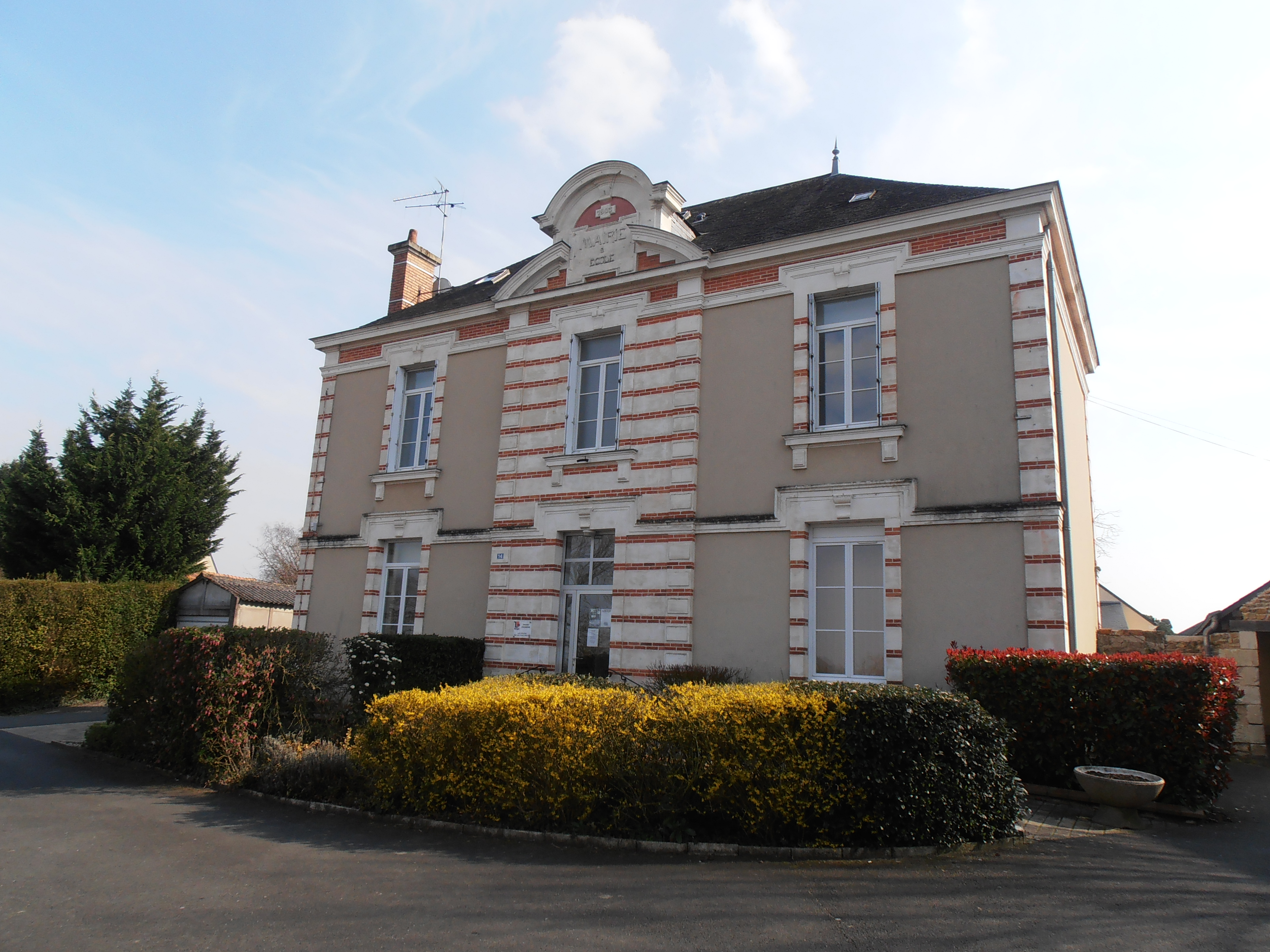 La mairie de Lézigné (Maine-et-Loire, France).